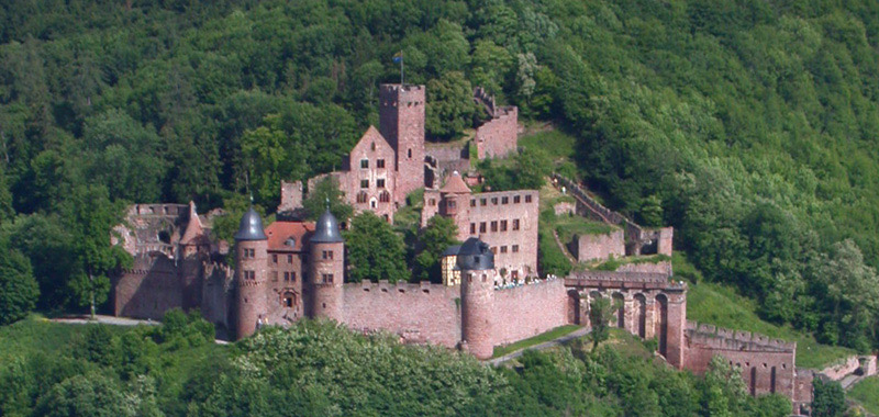 Burg Wertheim